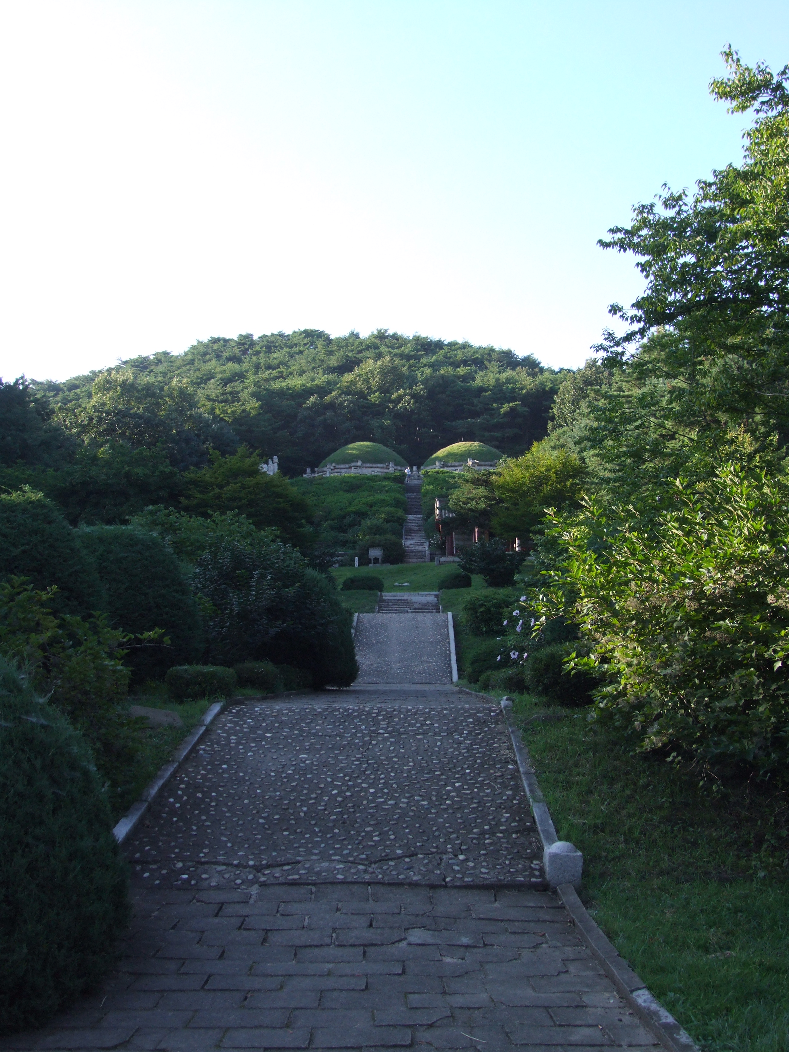 Tomb of King Kongmin